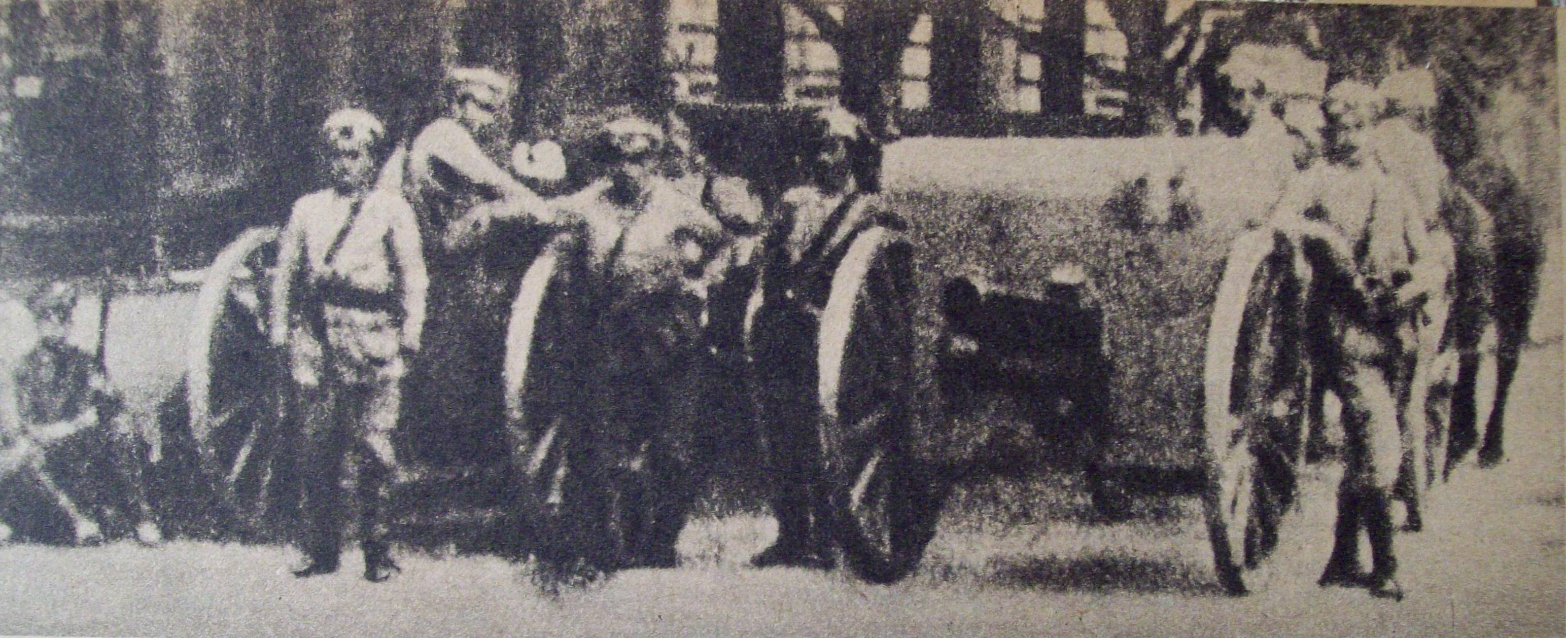 Cañones en la esquina del Congreso, en los sucesos conocidos como semana trágica 1919.